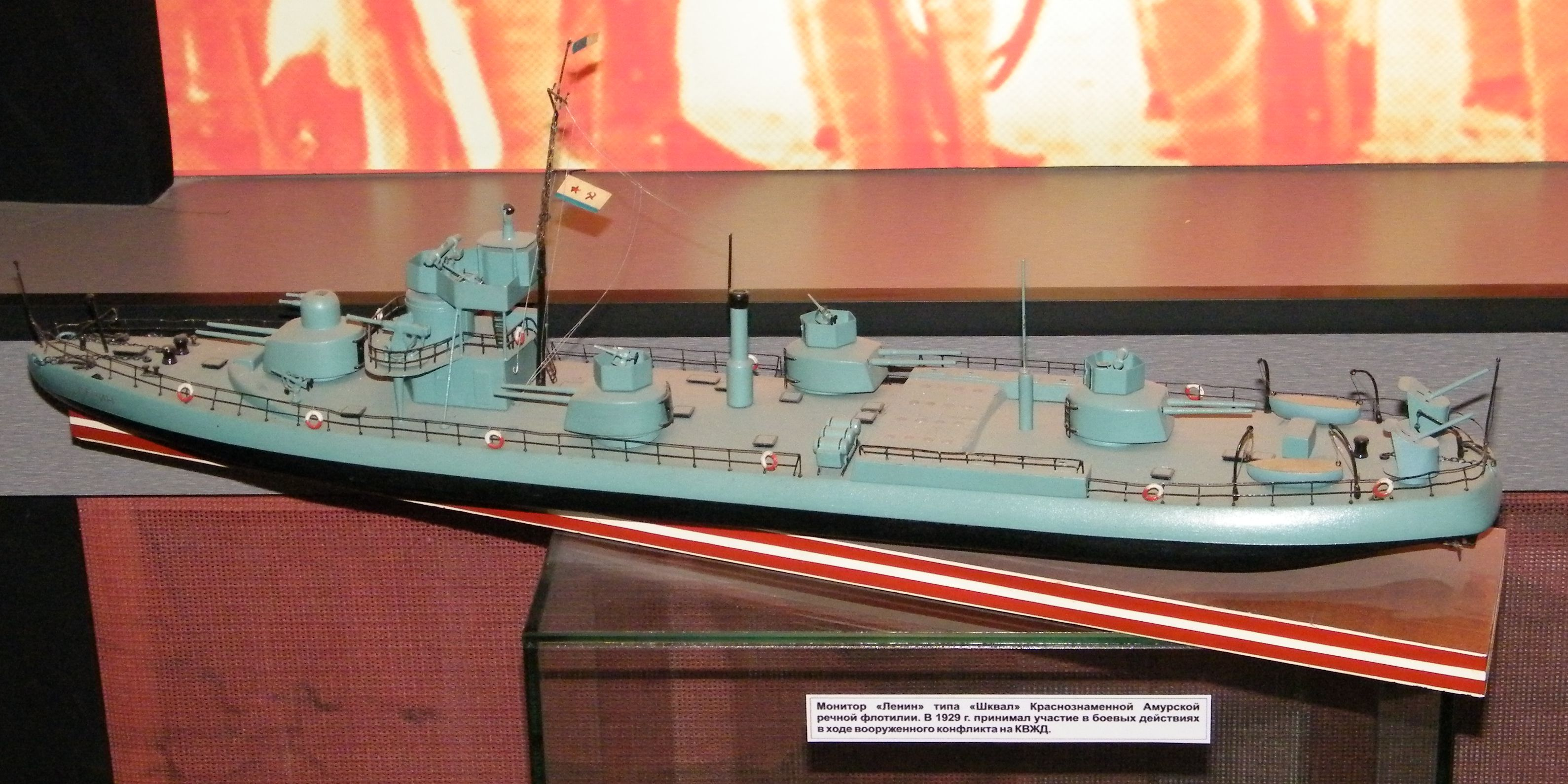 Монитор "Ленин" типа "Шквал", Амурская военная флотилия